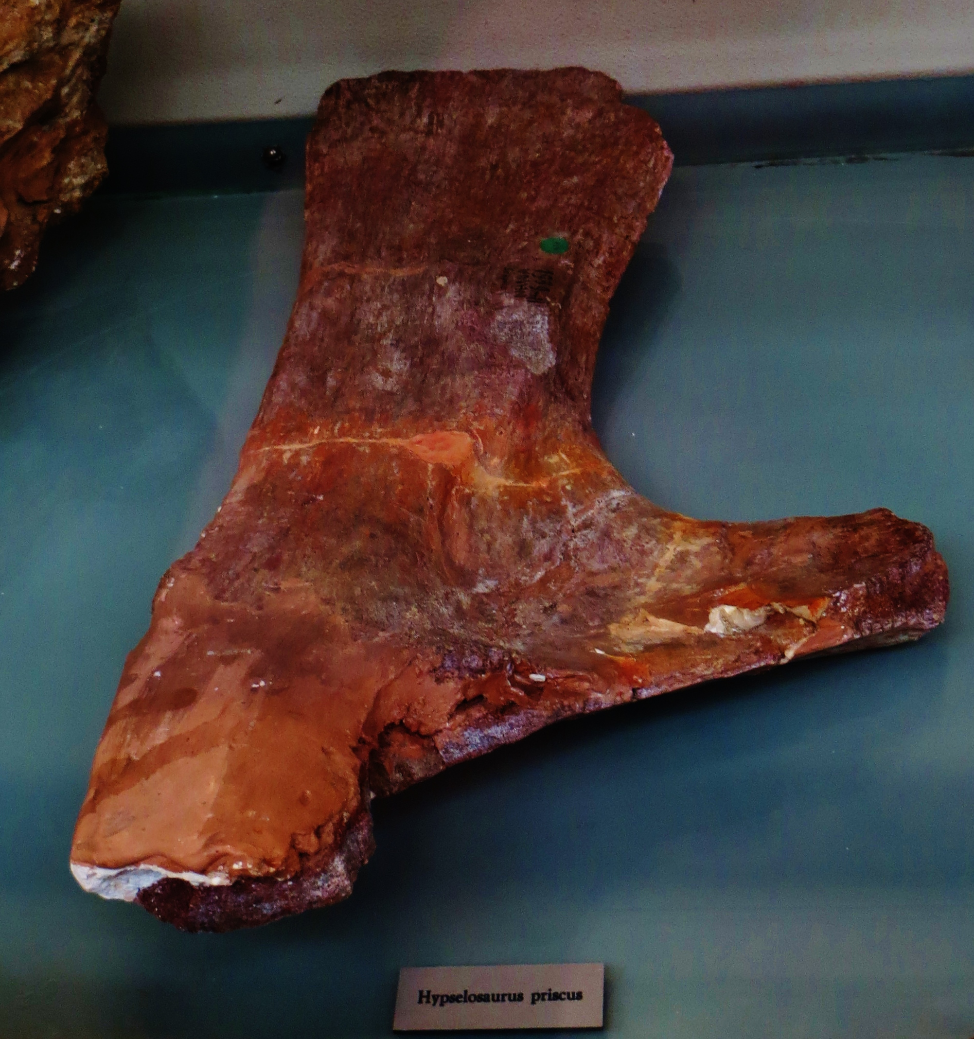 Fossil of Ampelosaurus, an extinct reptile- Took the photo at Musee d'Histoire Naturelle, Paris